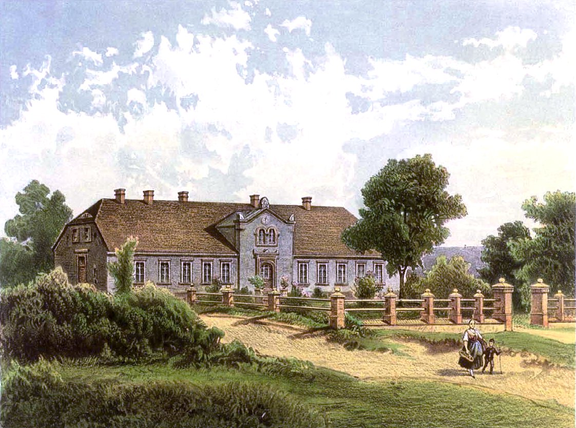 Rittergut Schübben, Lithografie aus dem 19. Jahrhundert